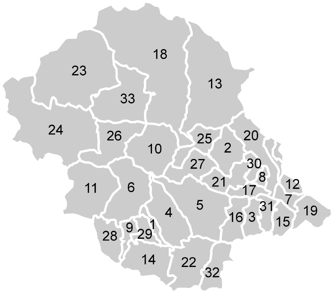 Lage der Gemeinden innerhalb des Bezirks Lienz